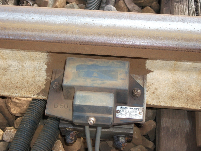 Compteur d'essieux Saxby en gare de Bourgtheroulde Thuit-Hébert